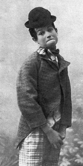 Maurice Chevalier à ses débuts, vers 1901-1902